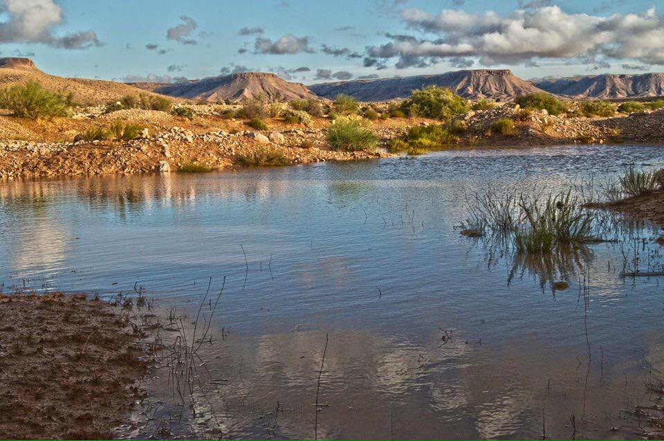 الطبيعة في ريف نالوت وادي نالوت في الشتاء